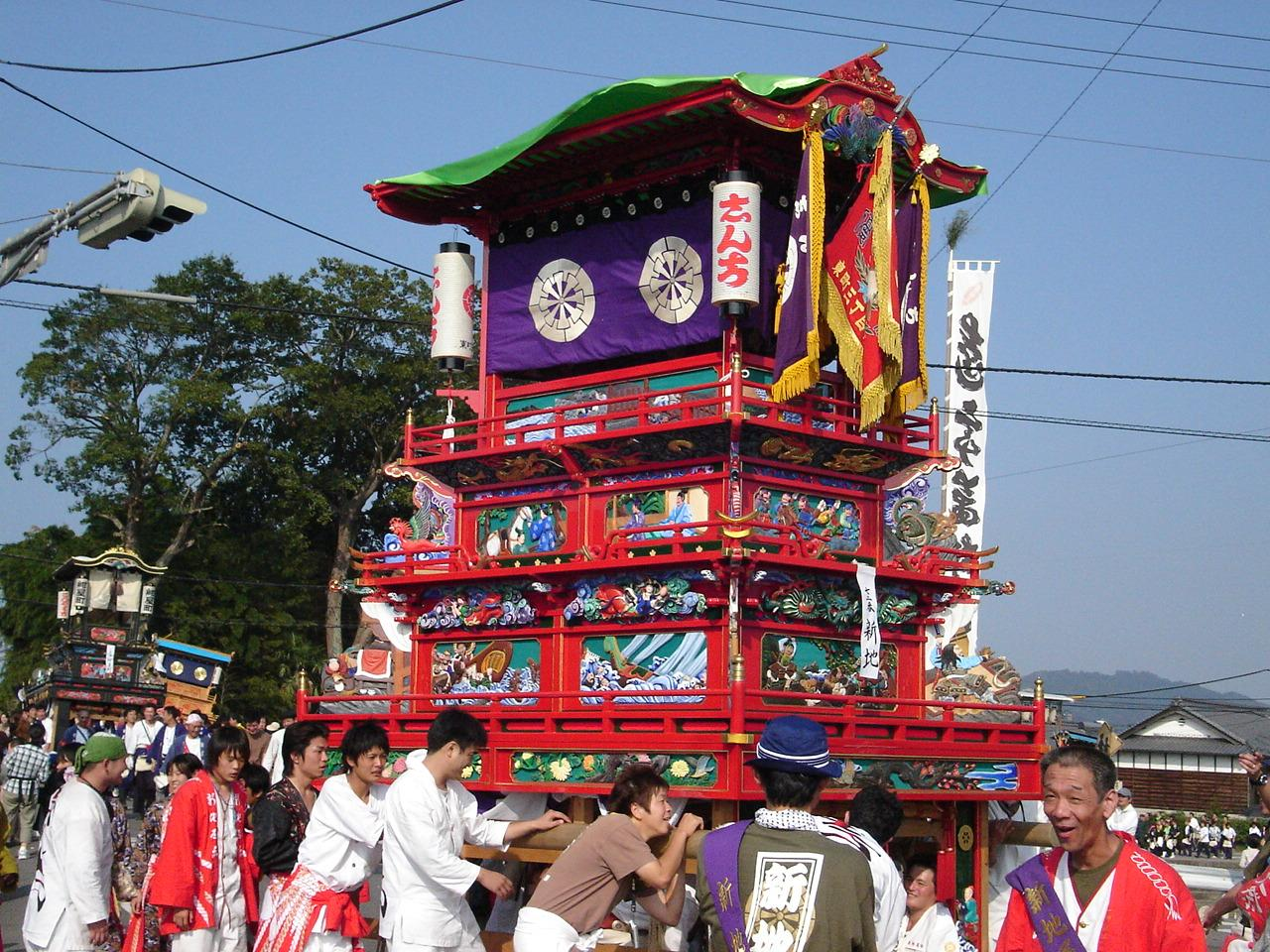 西条祭りの朱塗りだんじり